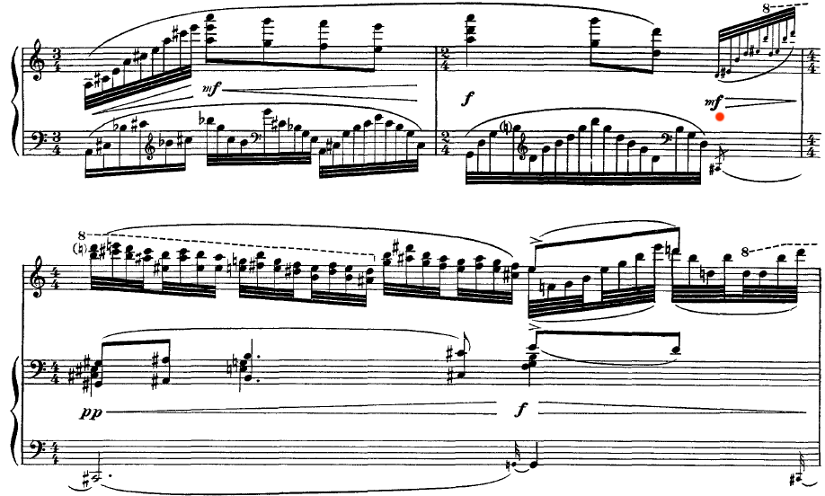 Evocation diabolique dans Ondine